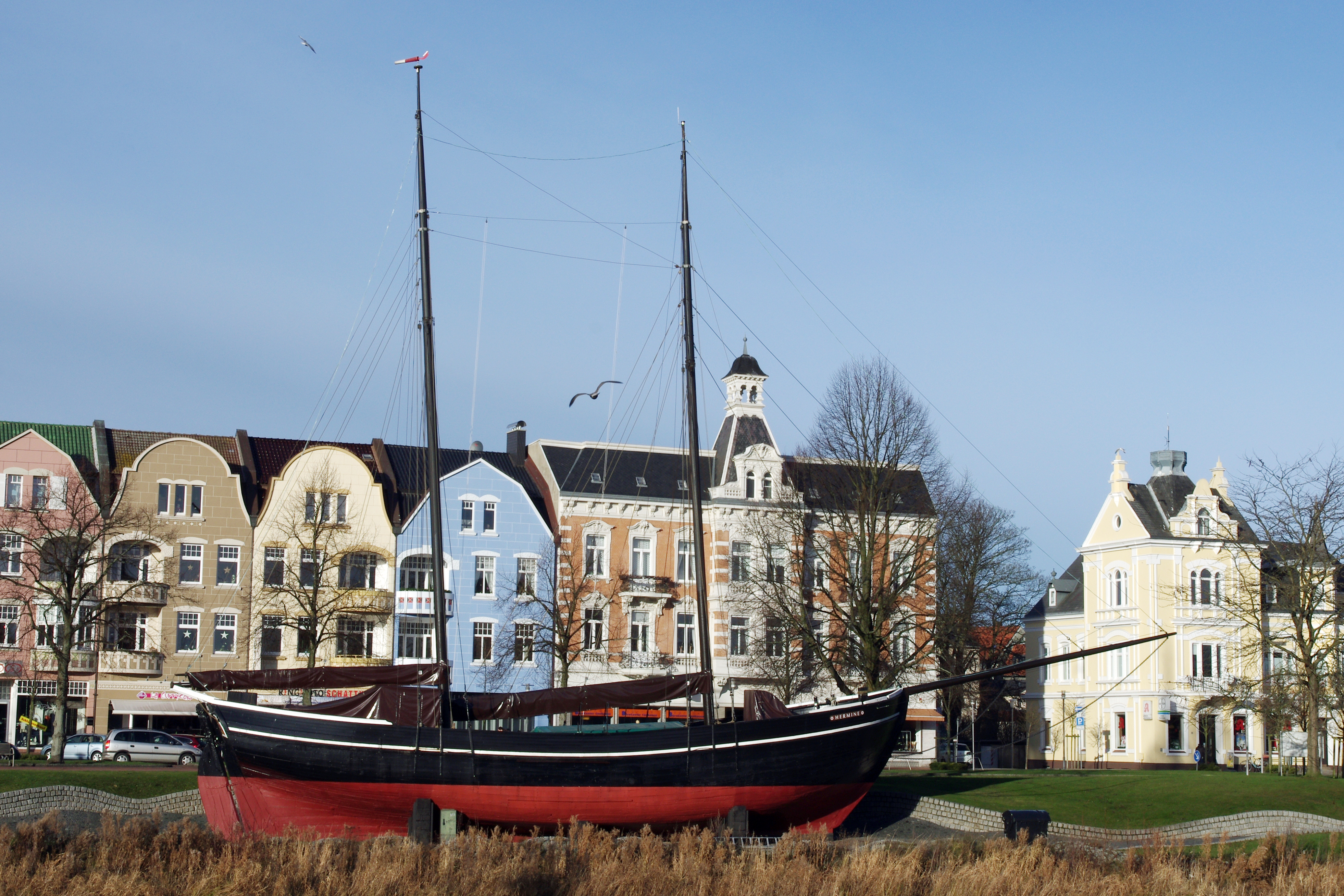 Cuxhaven in Niedersachsen. Das Schiff gefindet sich an der Deichstraße und steht unter Denkmalschutz.